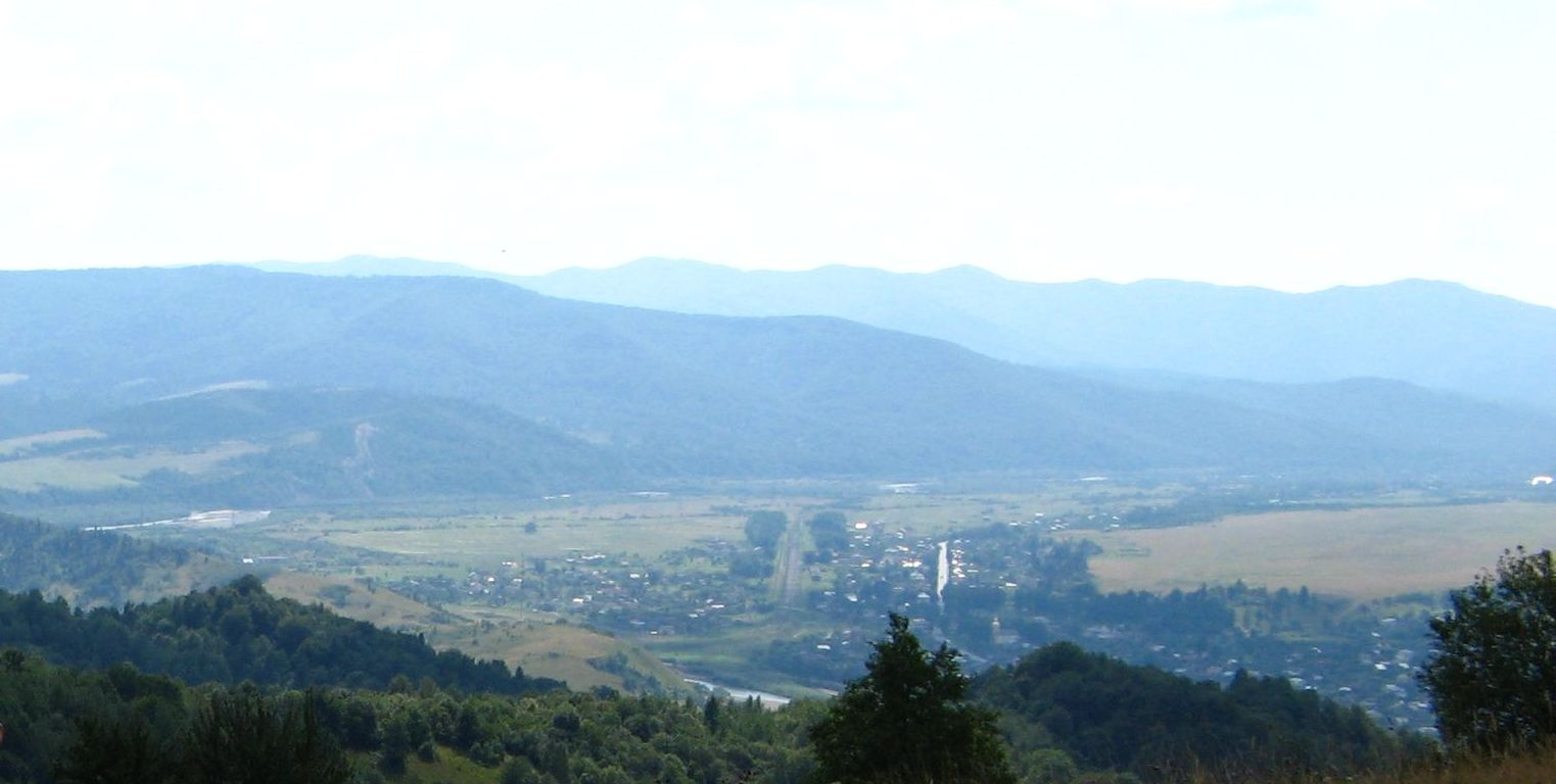 Верхнє Синьовидне (Сколівський район)